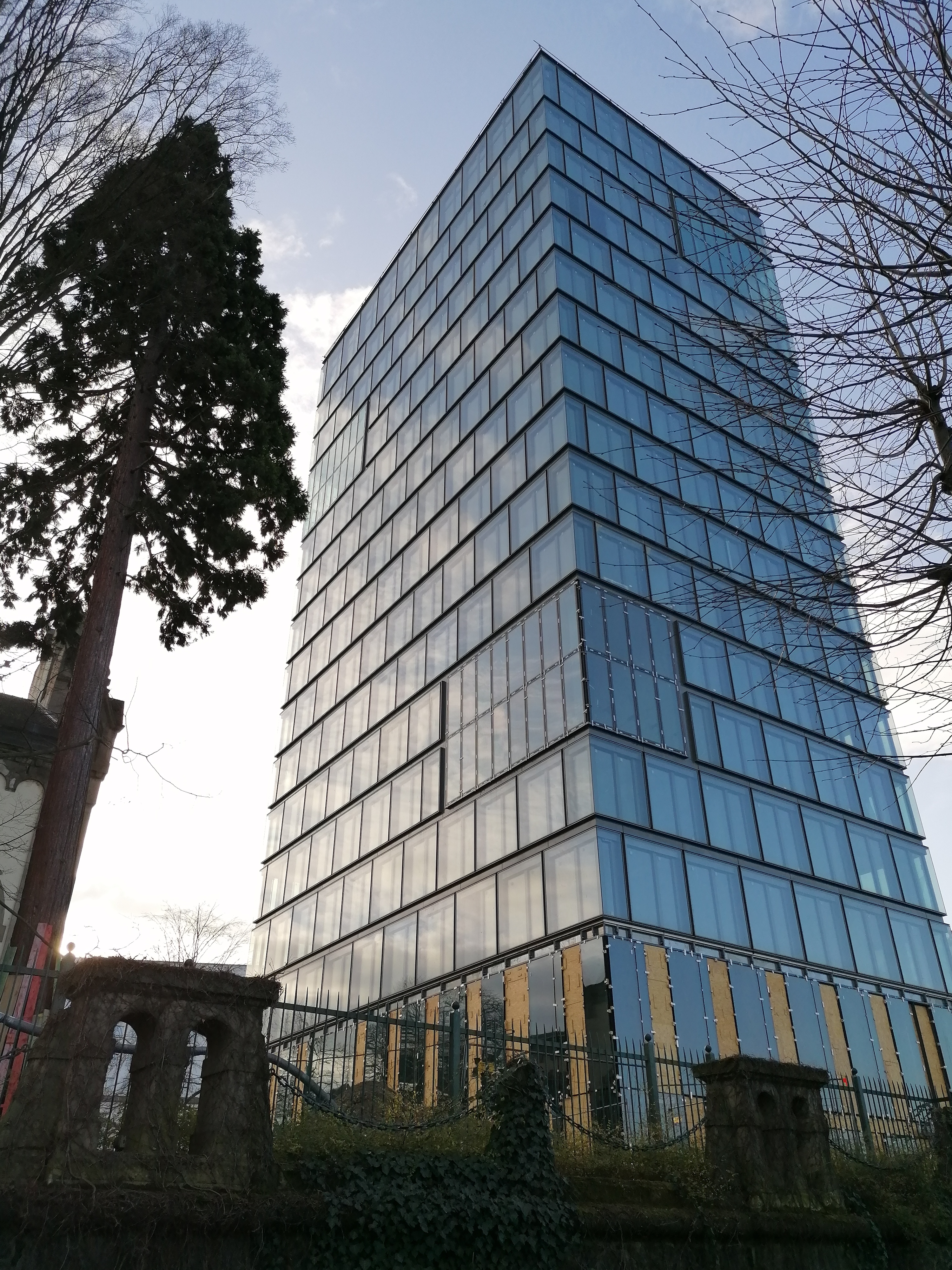 Das Neue UN-Hochhaus in Bonn am 26. Januar 2020